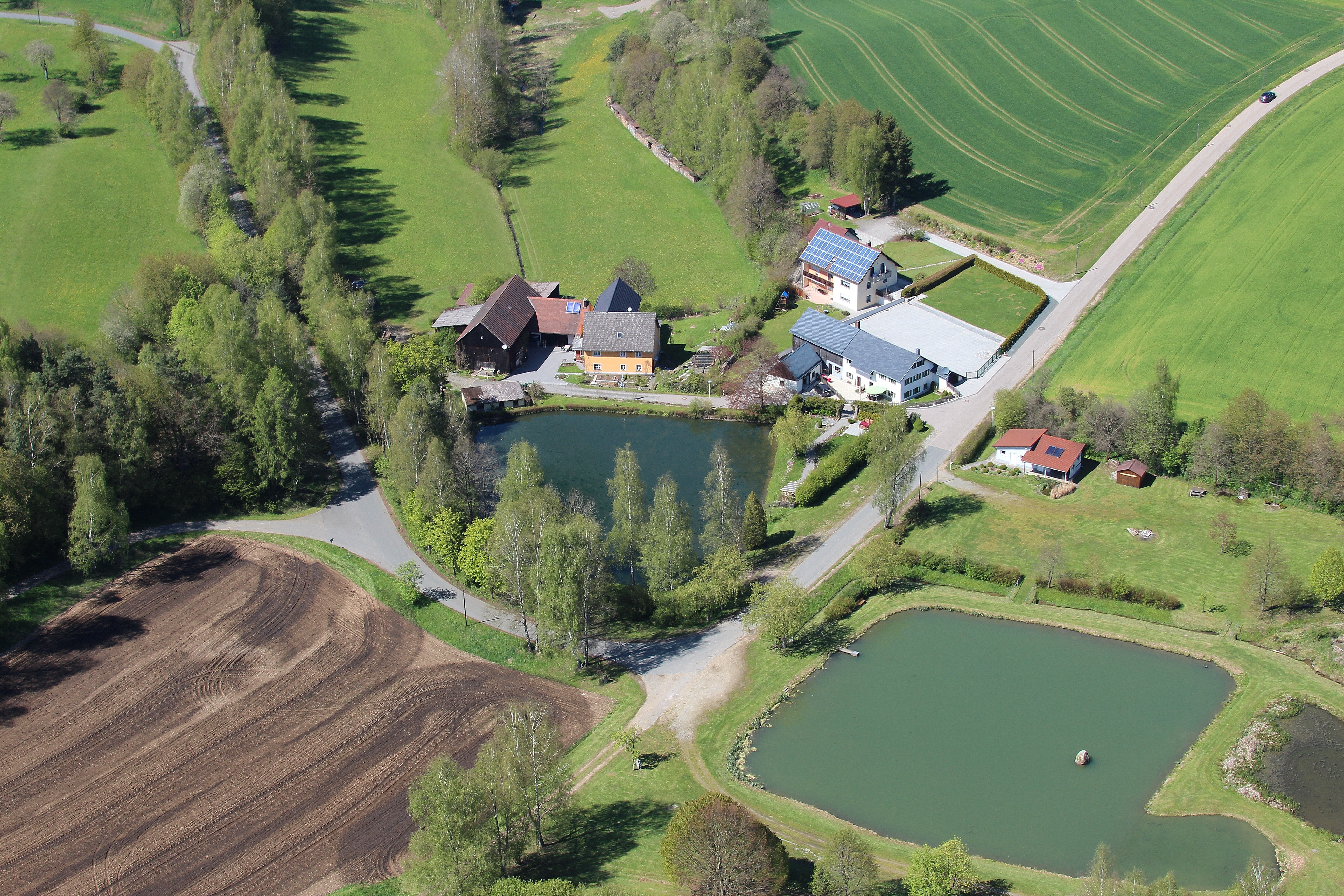 Kroau mit Badeweiher der Gemeinde; Gemeinde Gleiritsch, Landkreis Schwandorf, Oberpfalz, Bayern